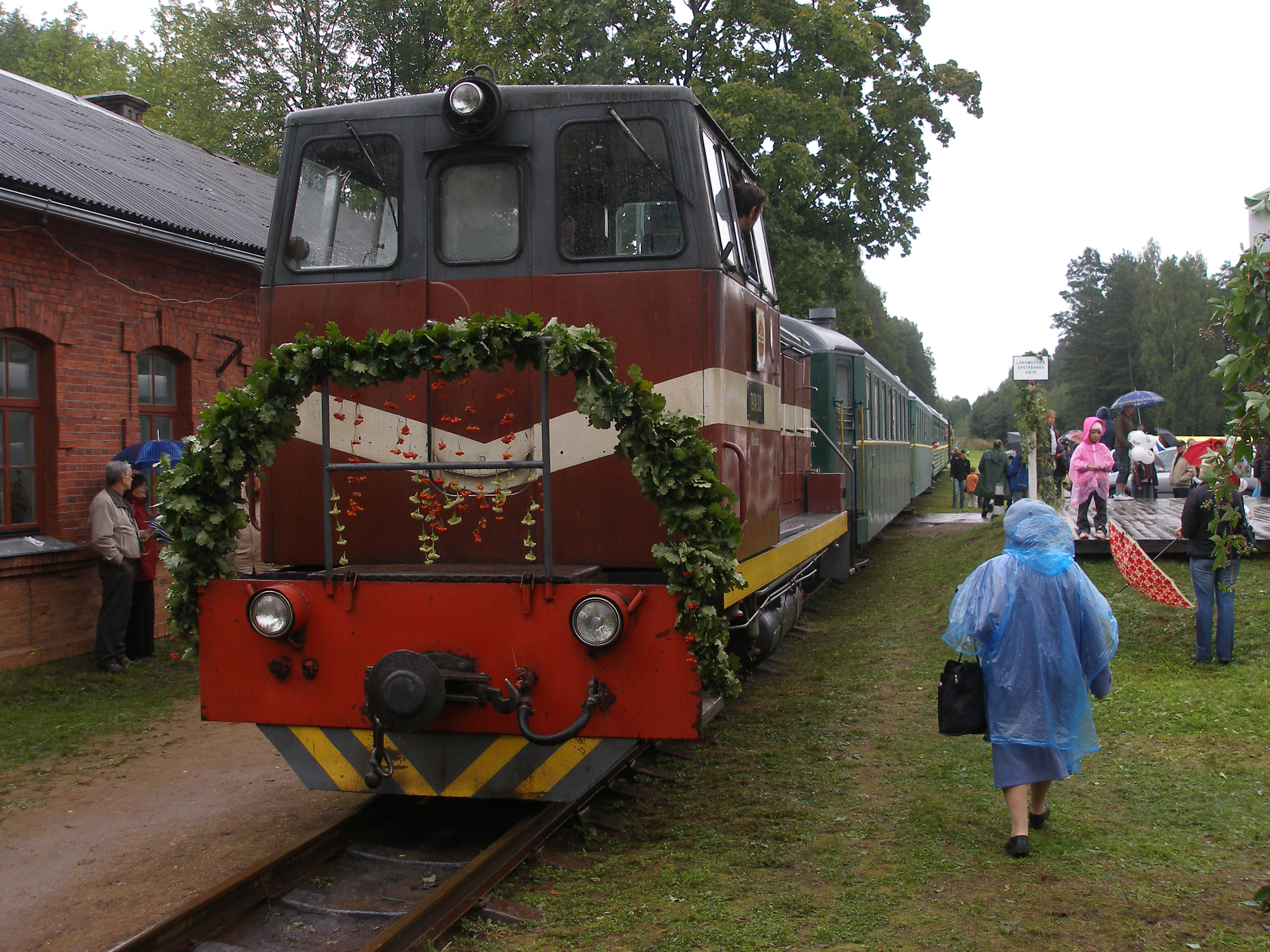 Lokomotīve TU-7 Stāmerienes stacijā